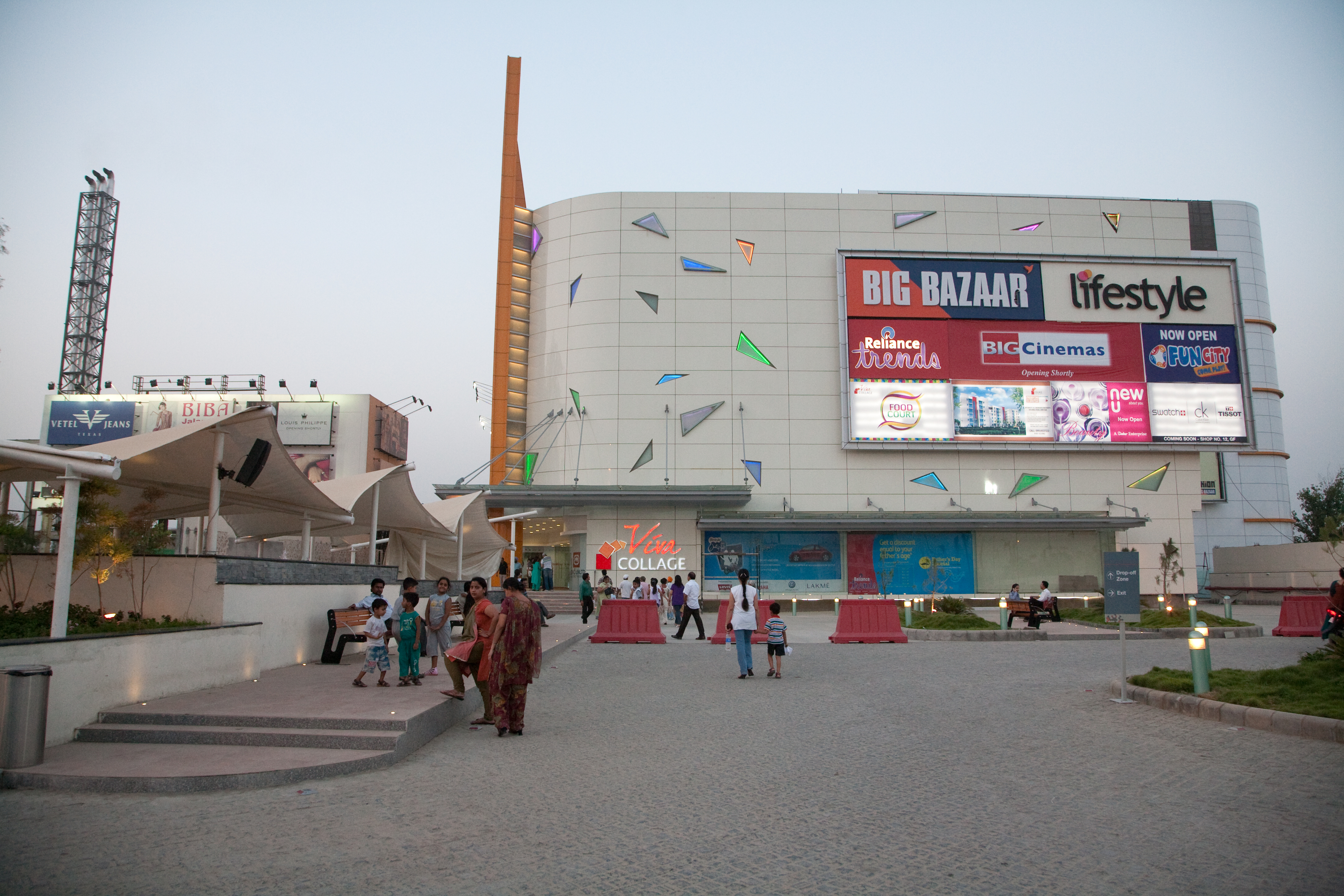 Shopping Mall at Jalandhar, Punjab, India.